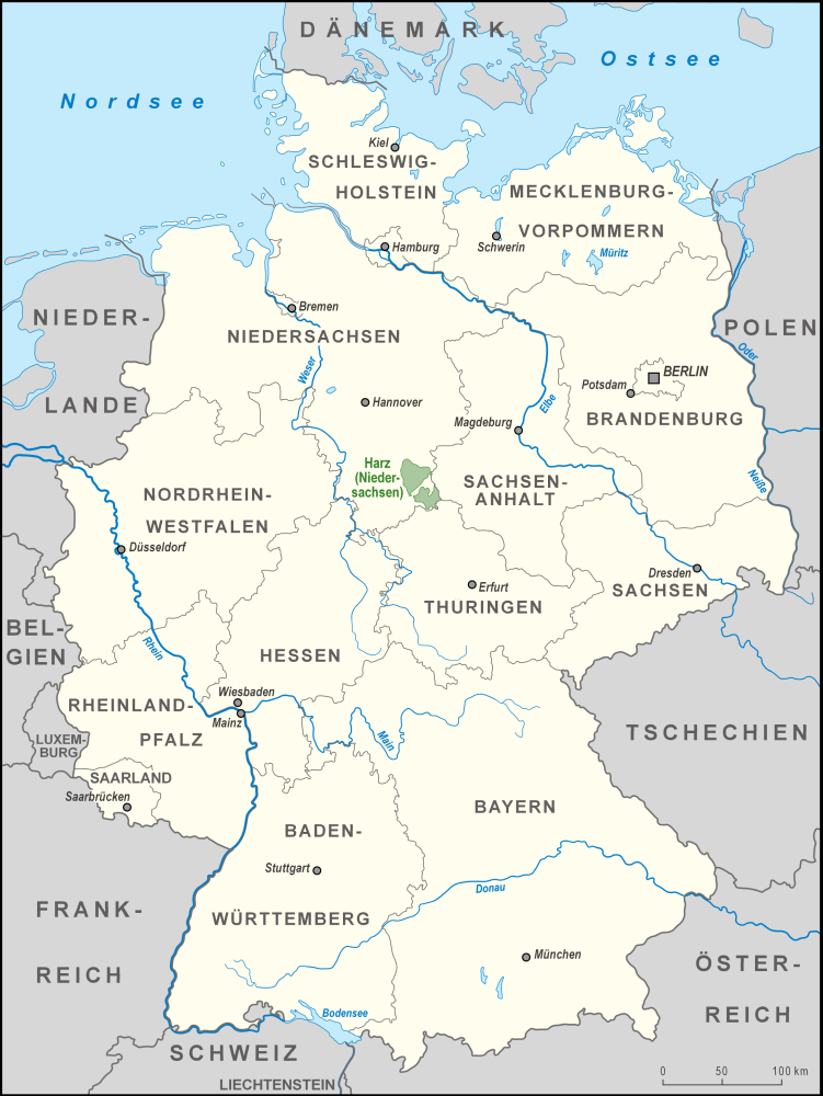 Karte des Naturparks Harz (Niedersachsen) in Deutschland